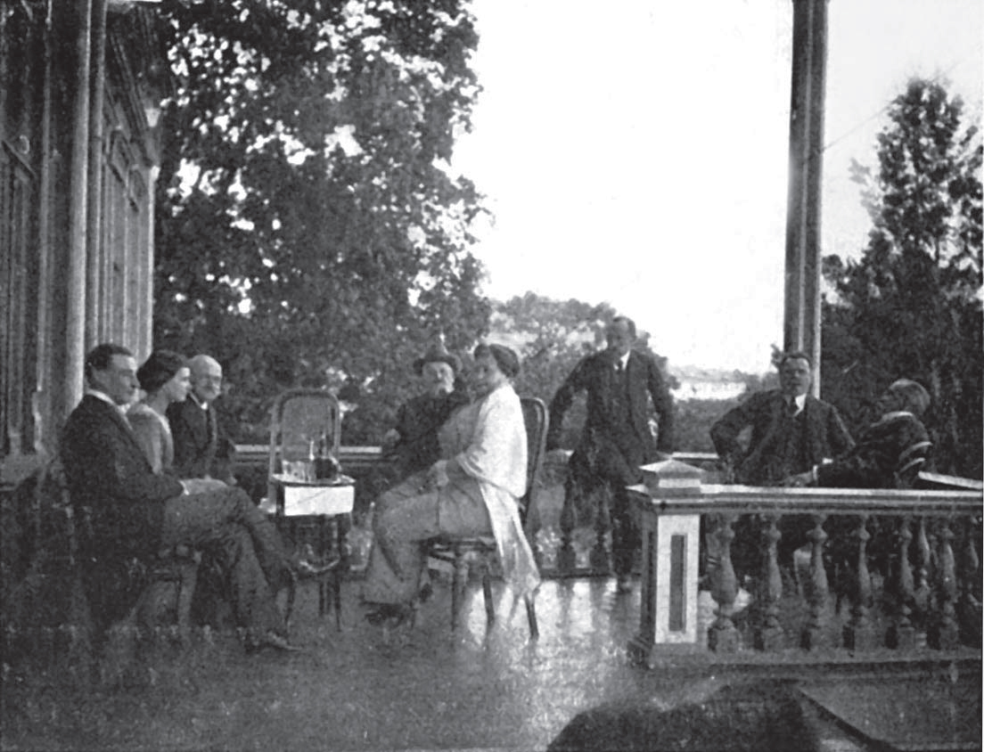 Беларуская (тарашкевіца): Быкаўшчына (Bykaŭščyna), сядзіба Козелаў Паклеўскіх (Kozieł Pakleŭski). Гаспадары сядзібы